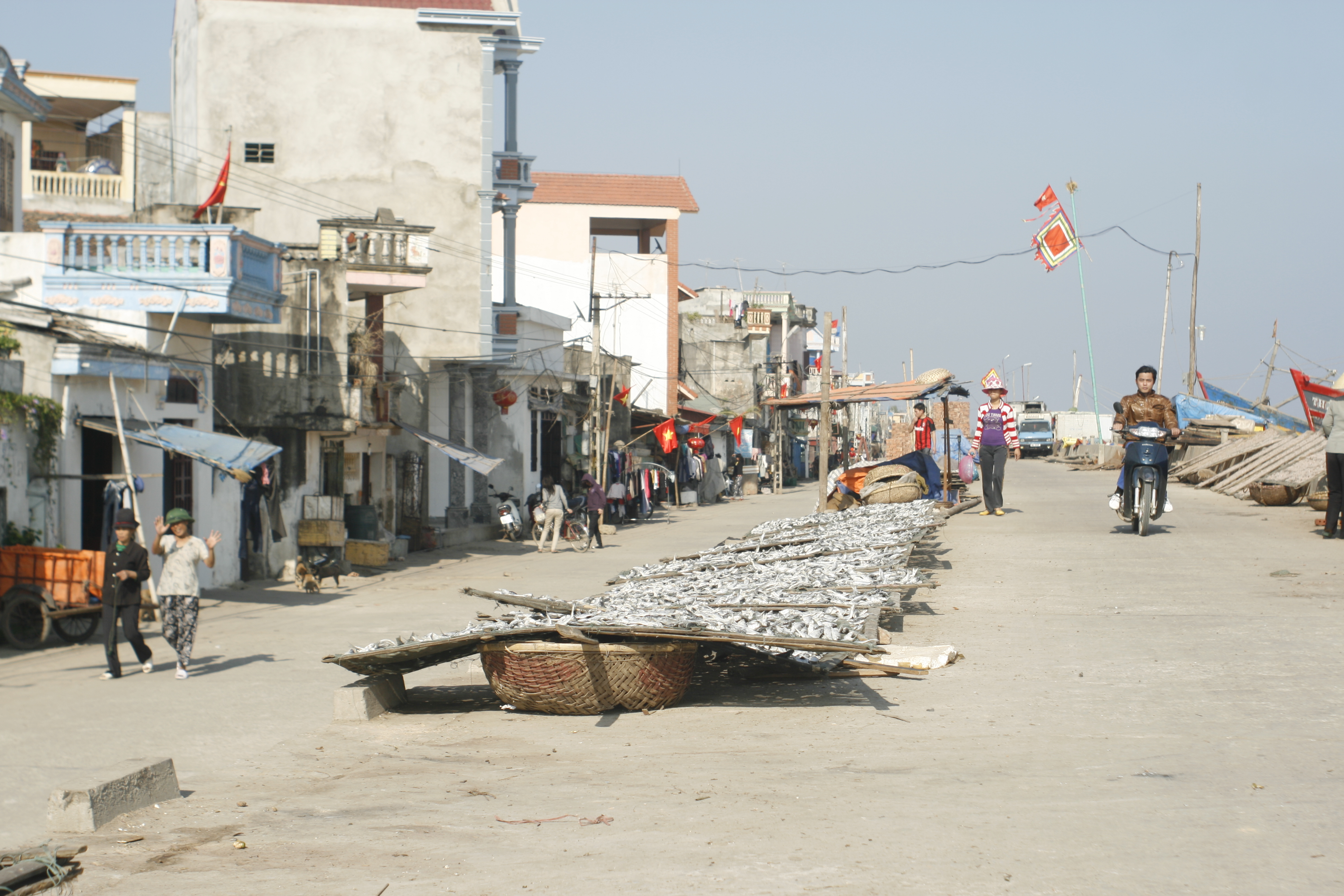 Diêm Phố, xã Ngư Lộc, Hậu Lộc, Thanh Hóa